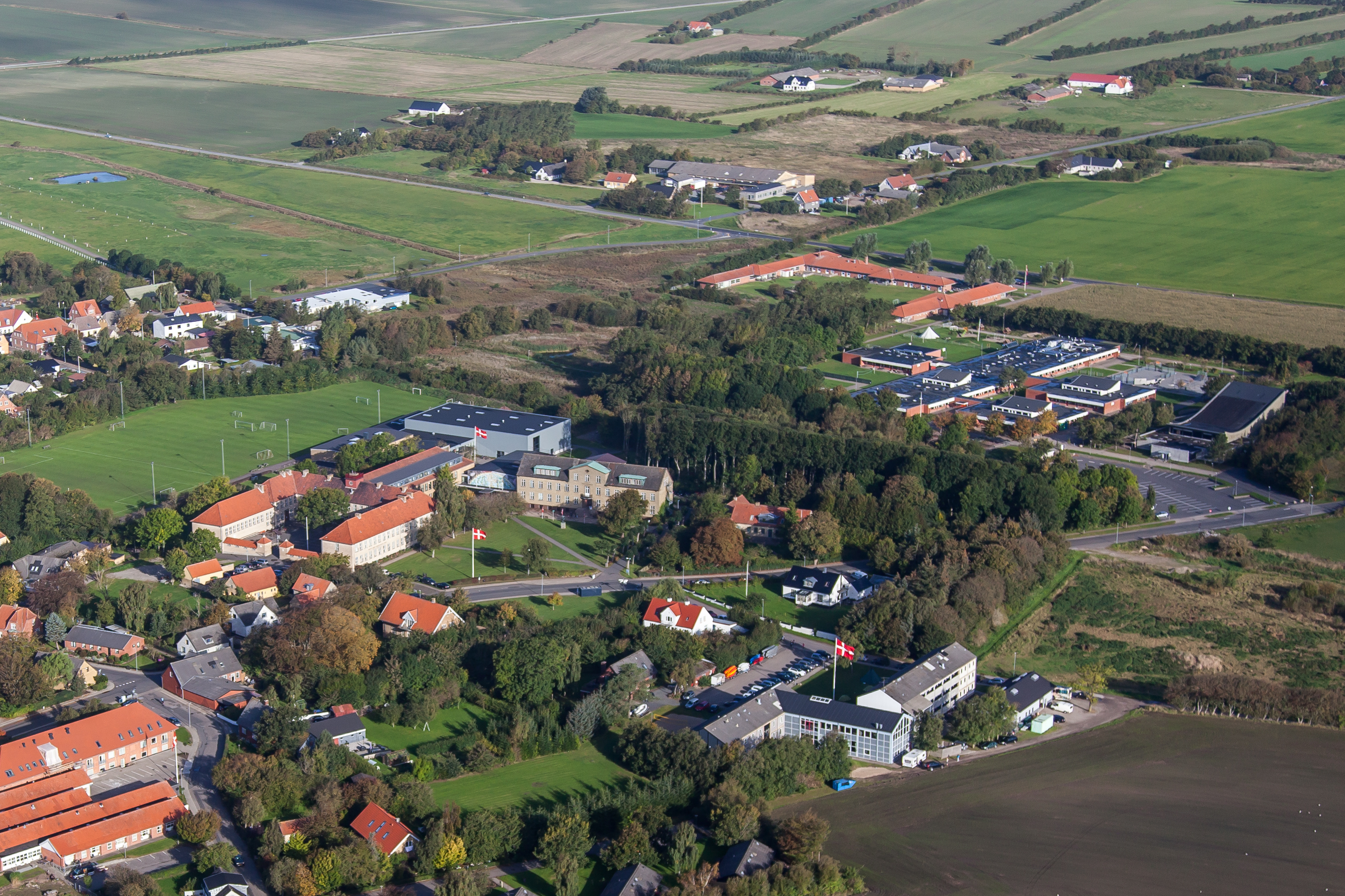 Luftfoto af Ranum Efterskole College